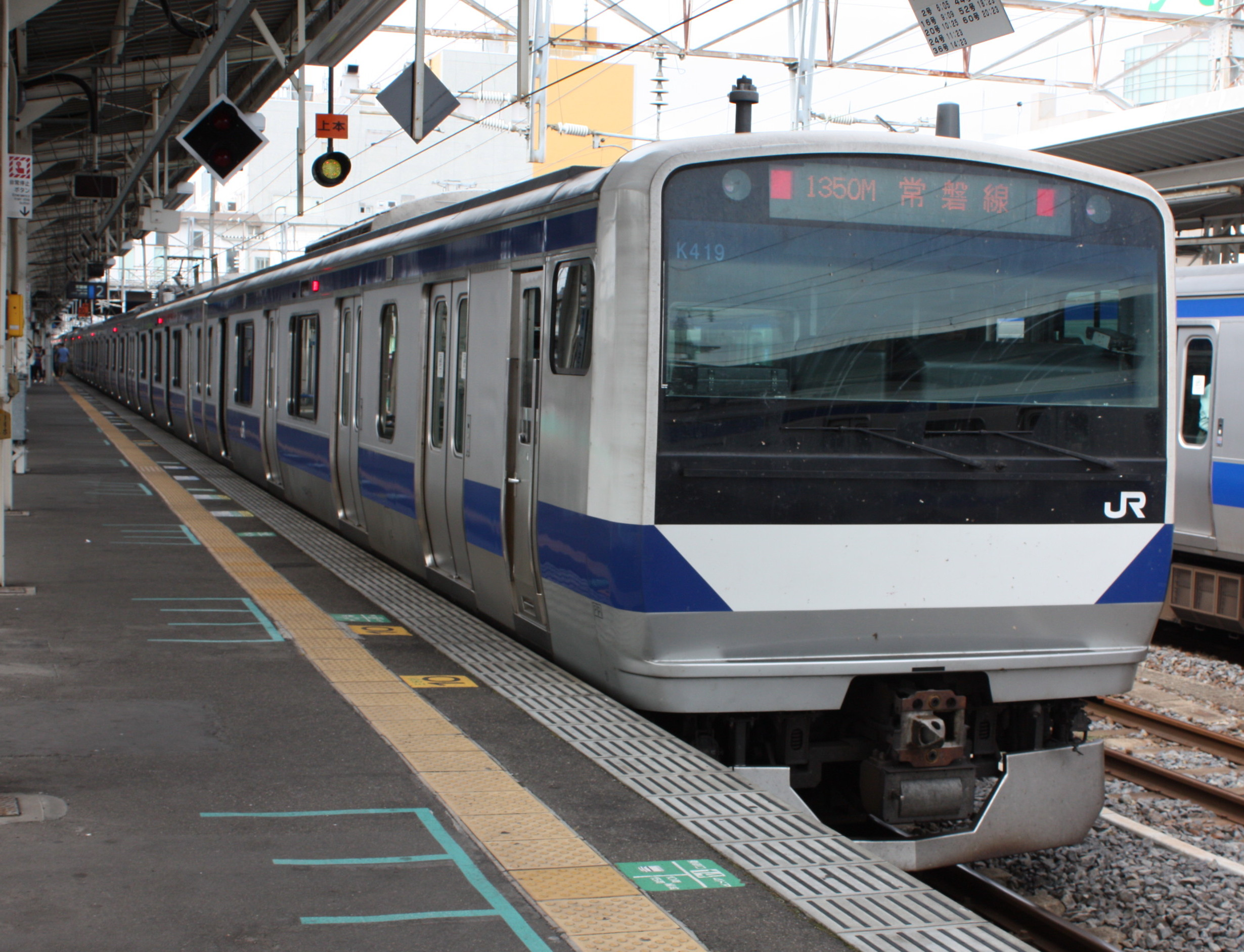 半自動ドア中のE531系（土浦にて）